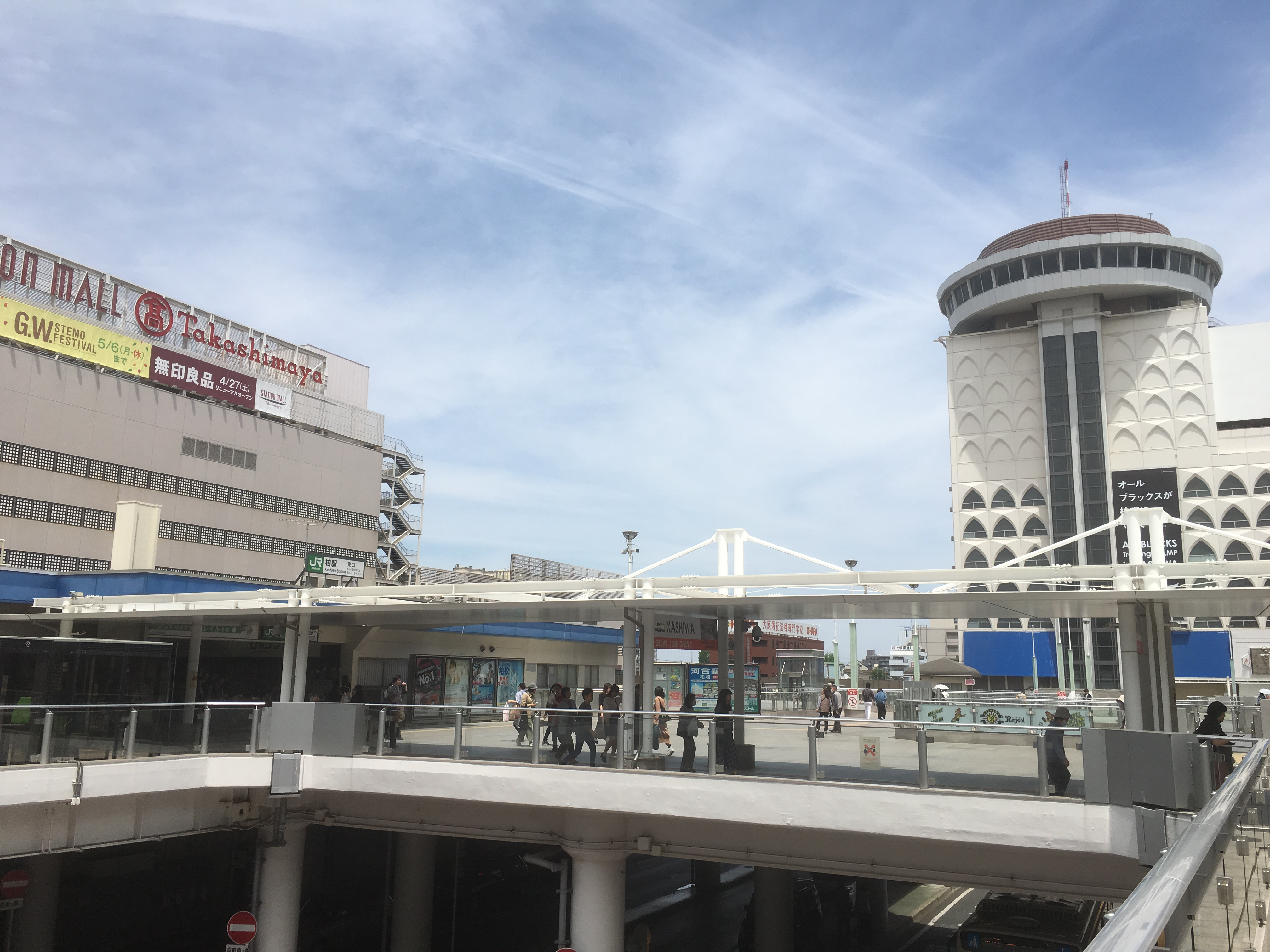 柏駅 (Kashiwa Station)